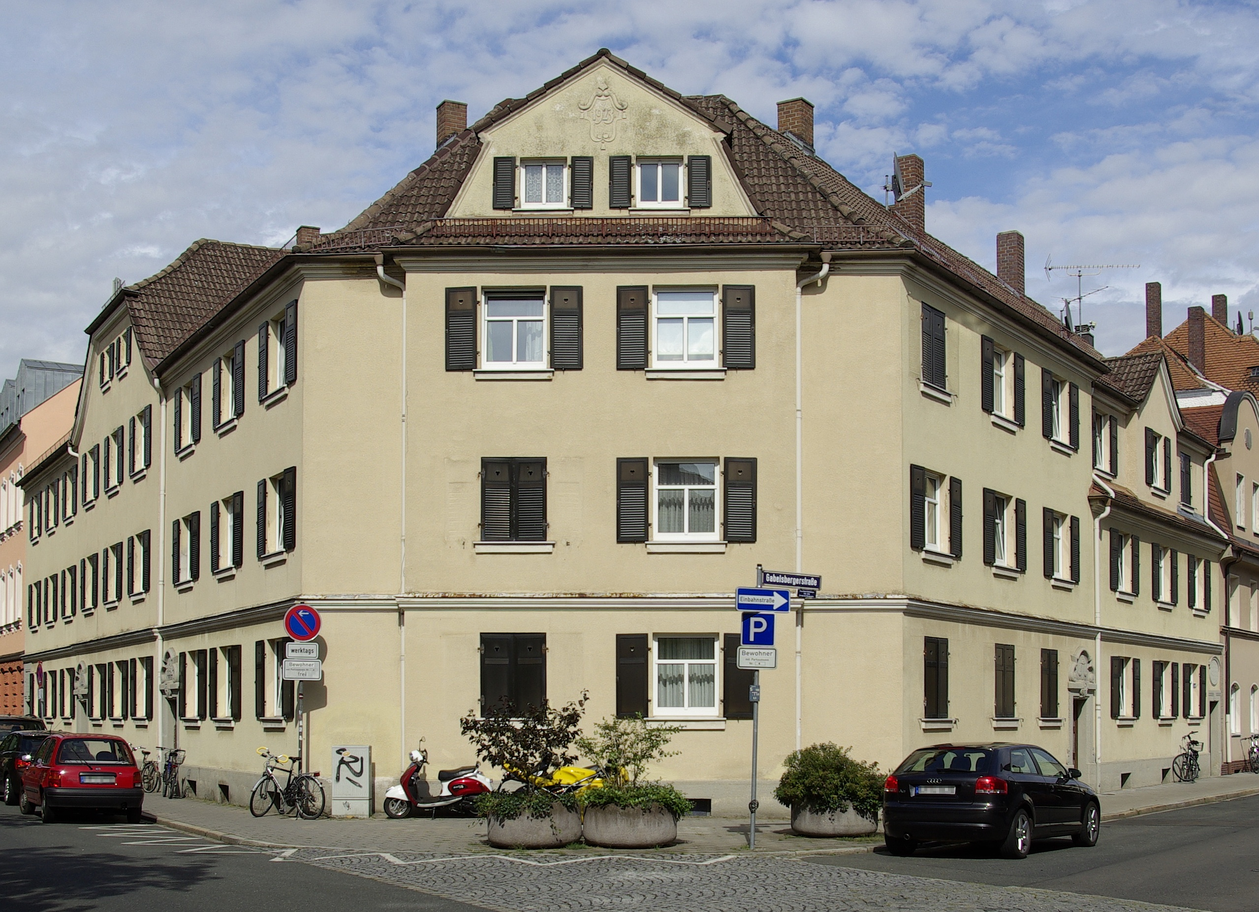 Wohnhaus Werner-von-Siemensstraße 21, 23, 23 ½ / Gabelsbergerstraße 1, 1 ½ in Erlangen